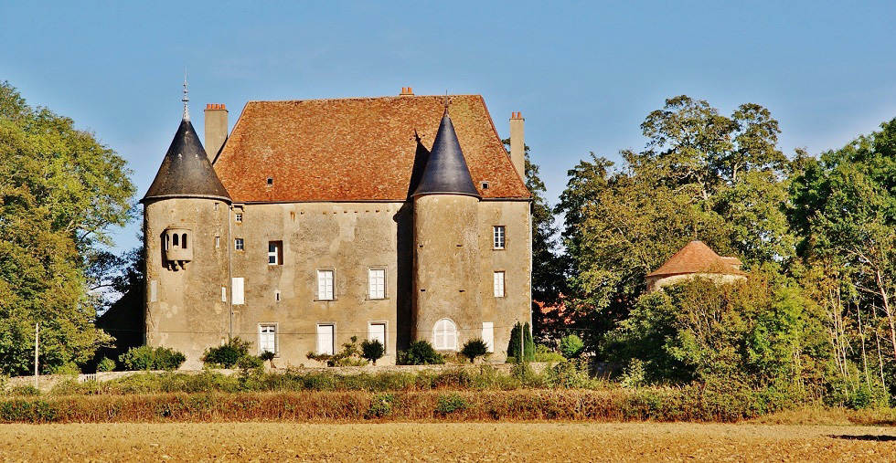 Le Château